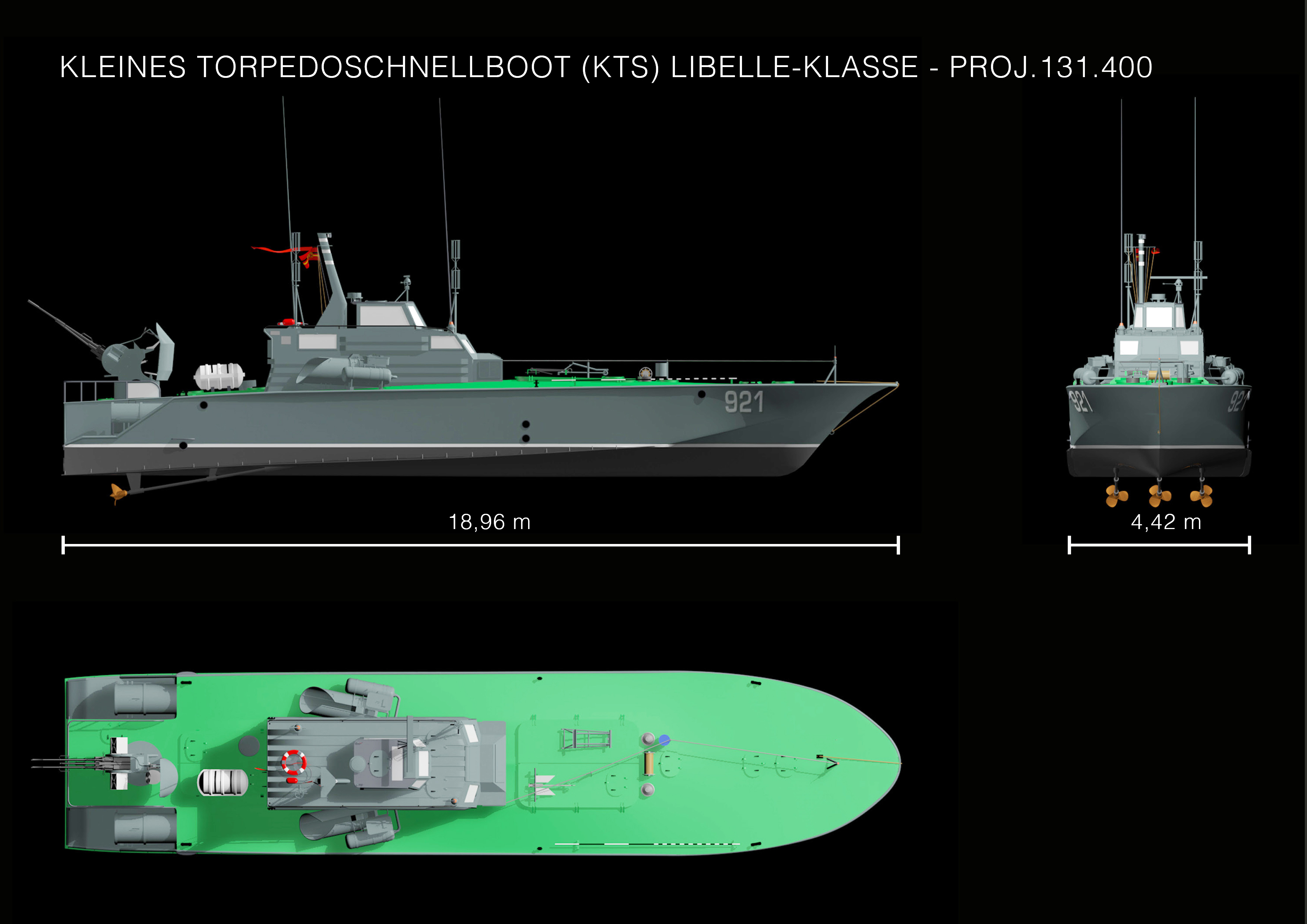 Dreiseitendarstellung des leichten Torpedoschnellbootes KTS der Volksmarine der DDR